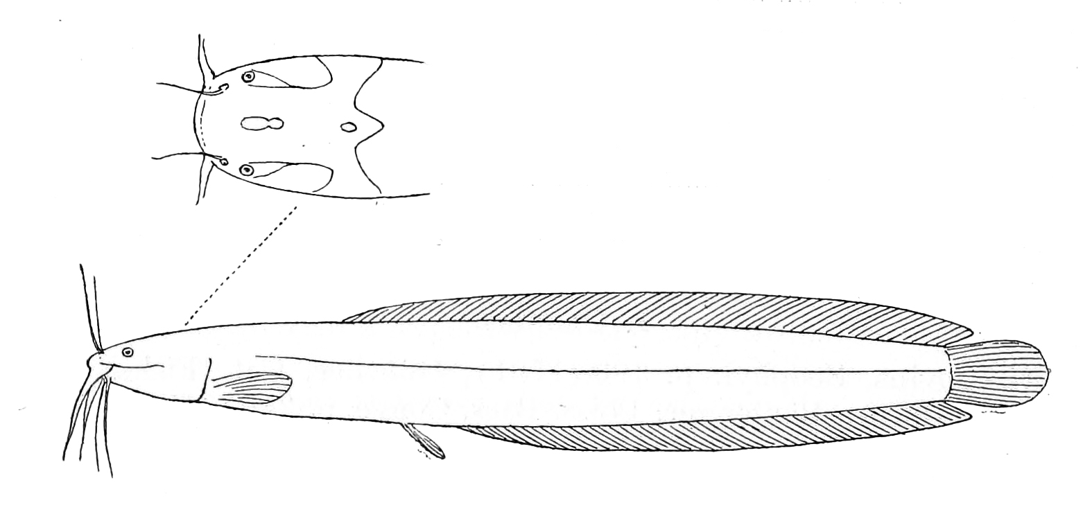 Clariallabes longicauda